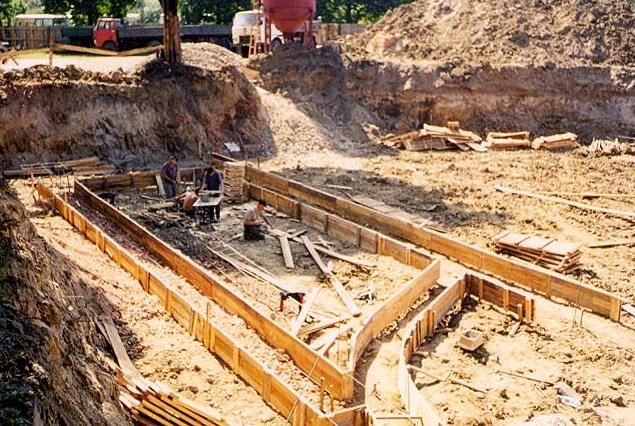 Szalunek (deskowanie) pod fundament.